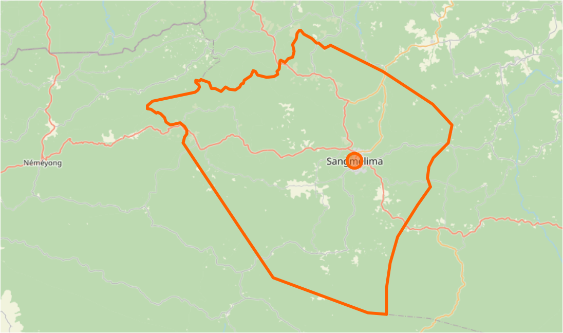 Limites communales de Sangmelima This map may be incomplete, and may contain errors. Don't rely solely on it for navigation.